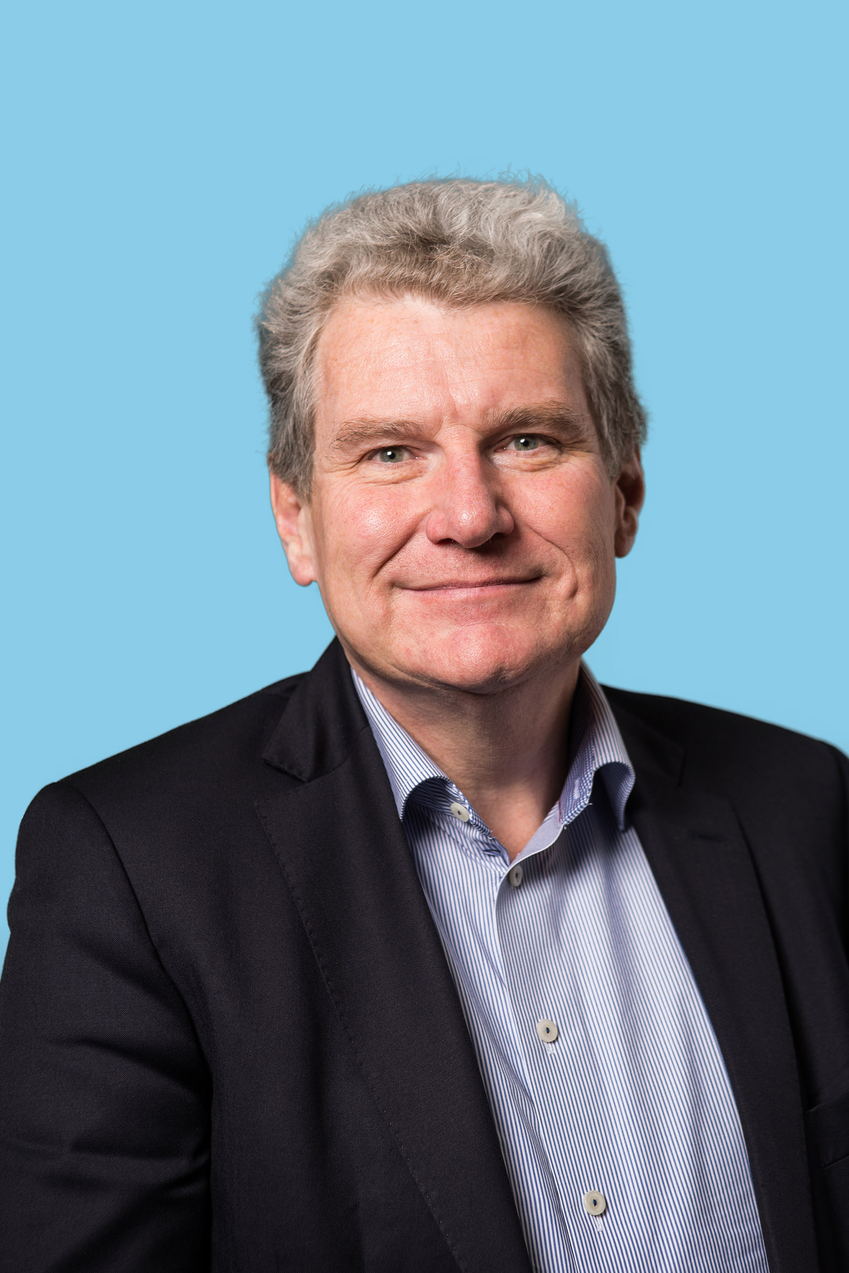 Kandidaat-Kamerlid. Foto: Lex Draijer.